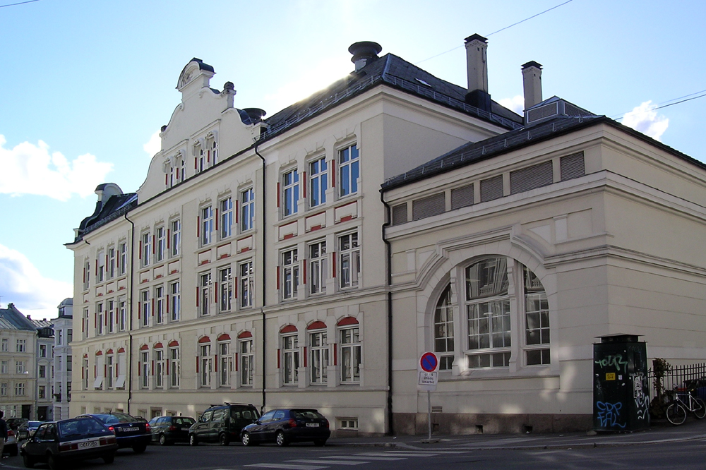 Frogner skole, Niels Juels gate 52 (tidligere Gjertsens Privatskole). Bygd 1899. Arkitekter: Ove Ekman og Einar Smith.